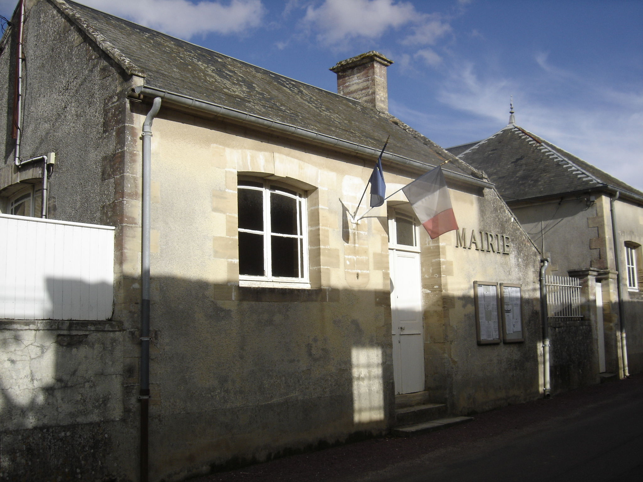 mairie de Sainte-Croix-sur-Mer